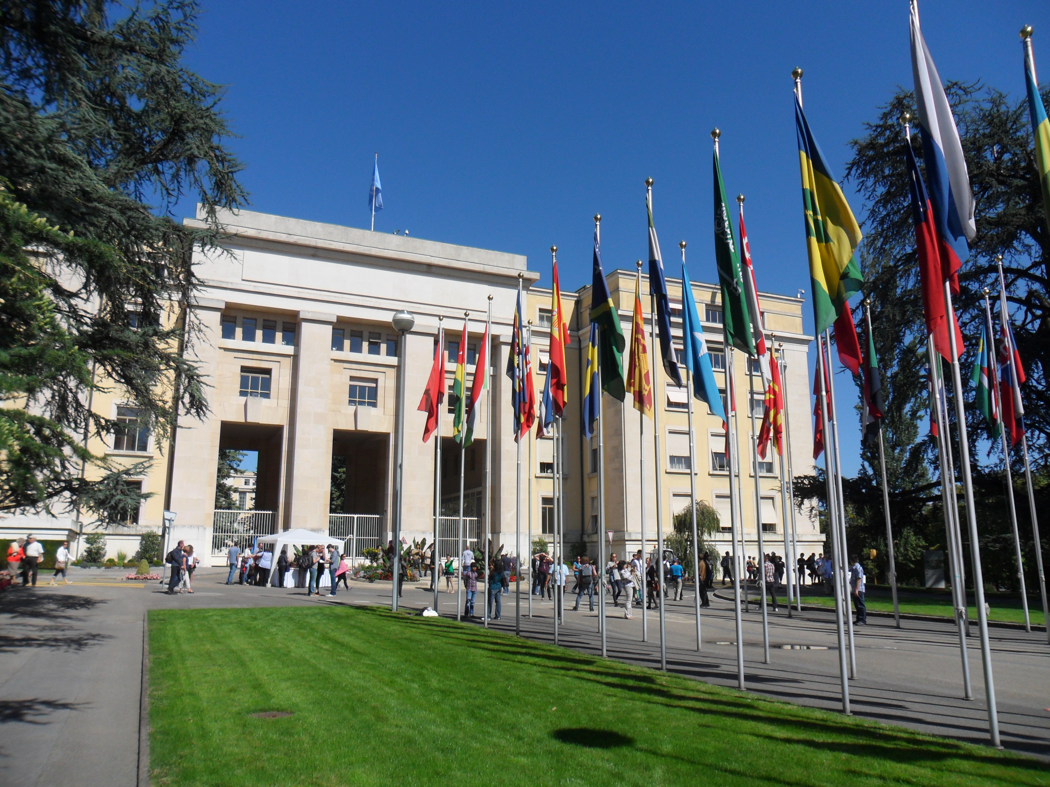 Allée des Nations devant le bâtiment S du Palais des Nations